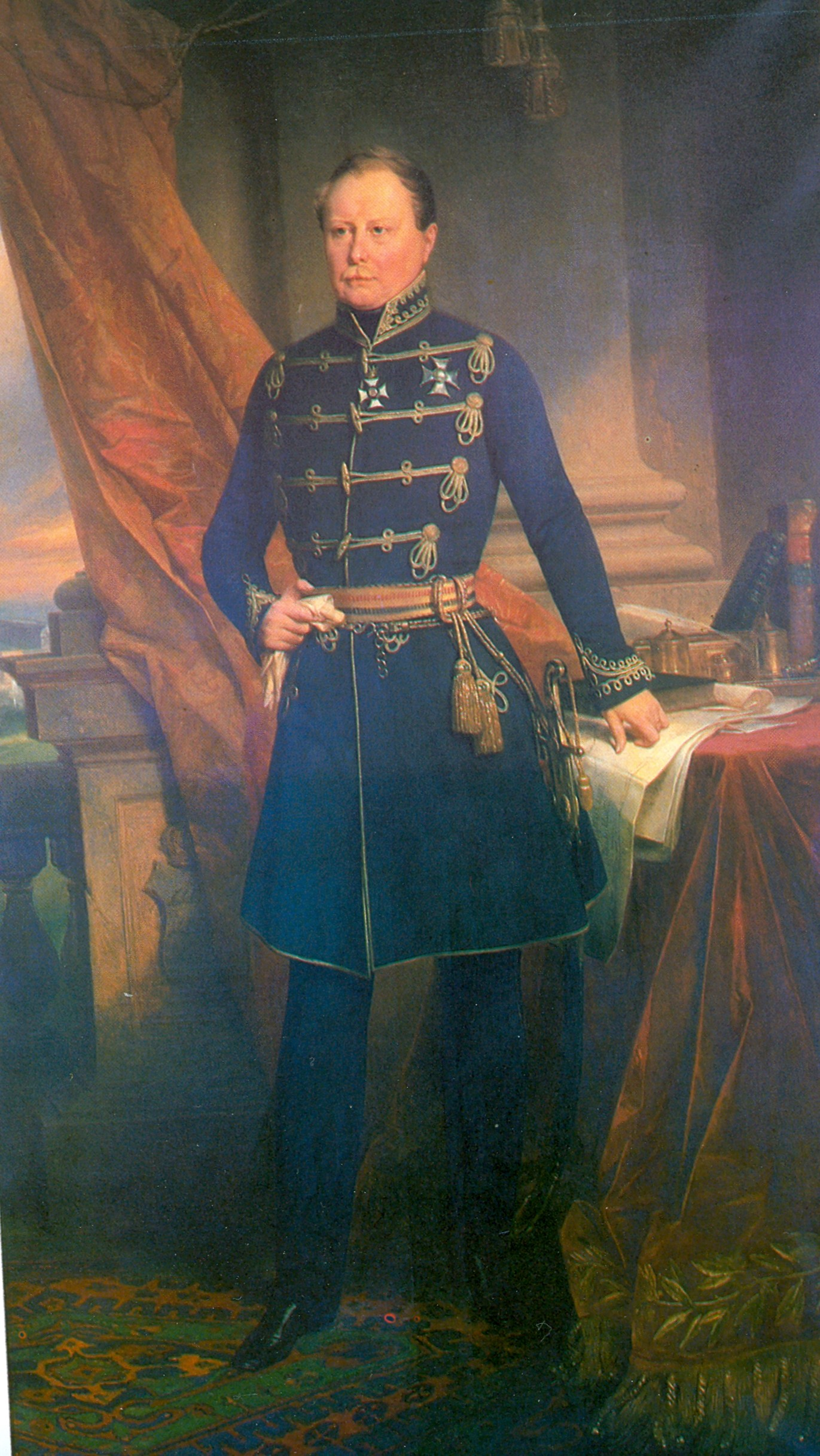 König Wilhelm I. von Württemberg (1816-1864)